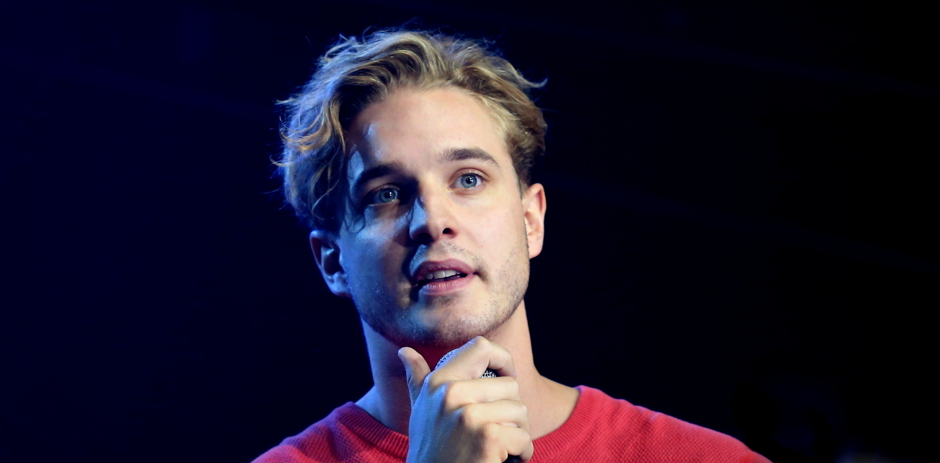 Vecsei H. Miklós, a Forráspont - Ifjúsági eucharisztikus nap meghívott vendégeként (MoM Sport Uszoda és Sportközpont, Rendezvényhelyszín)